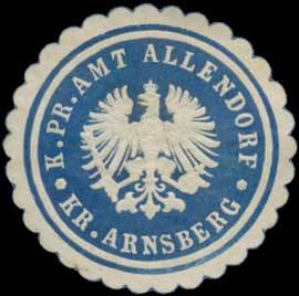 Sealing stamp Title: K. Pr. Amt Allendorf – Kreis Arnsberg Description: blau, weiß, geprägt Place: Allendorf size: 3 cm